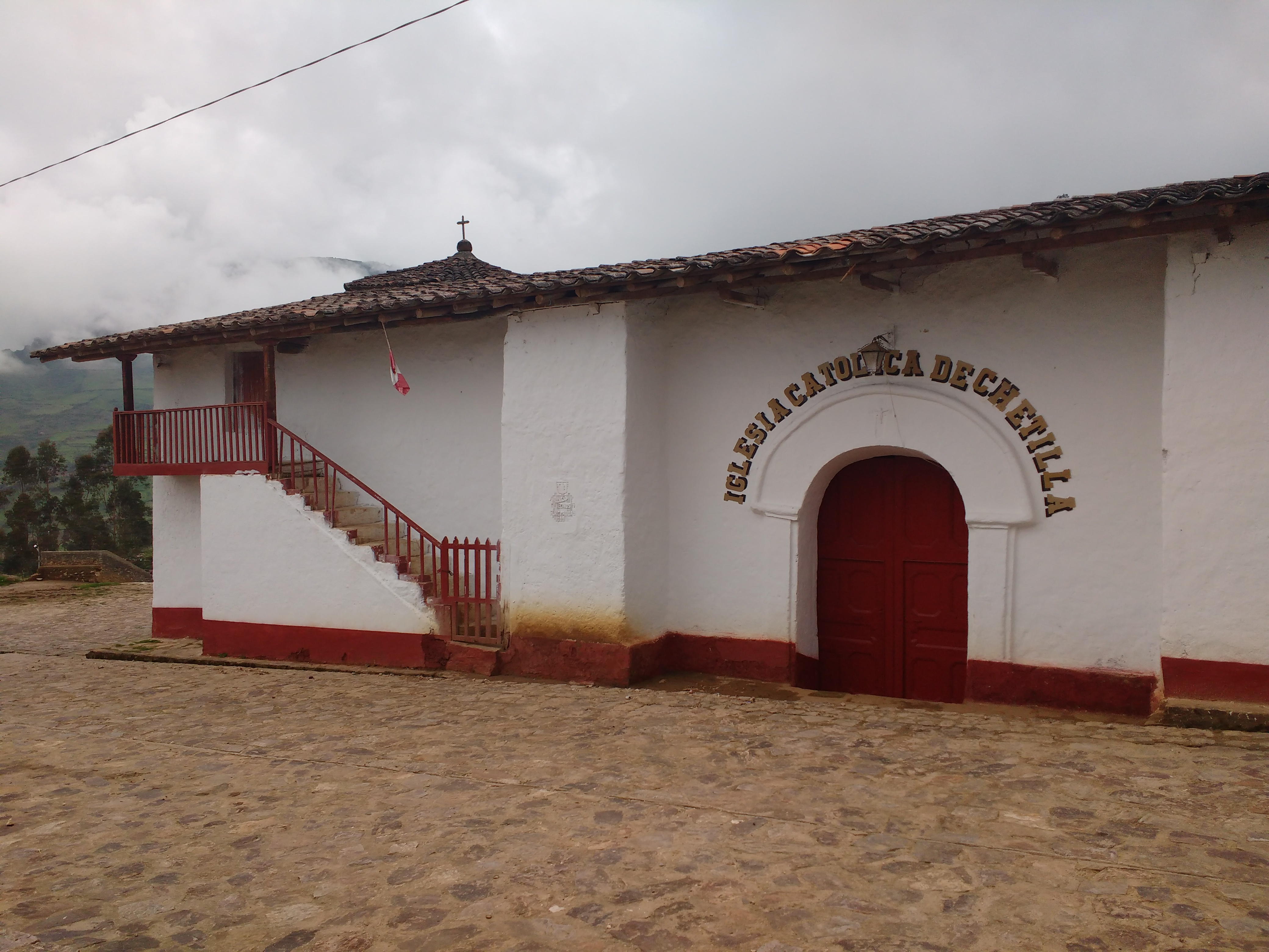 Vista lateral de la iglesia católica de Chetilla en frente de la plaza principal de esta misma localidad en la provincia de Cajamarca